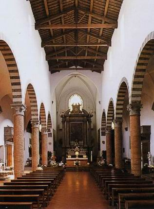 Sant'agostino in prato, inside